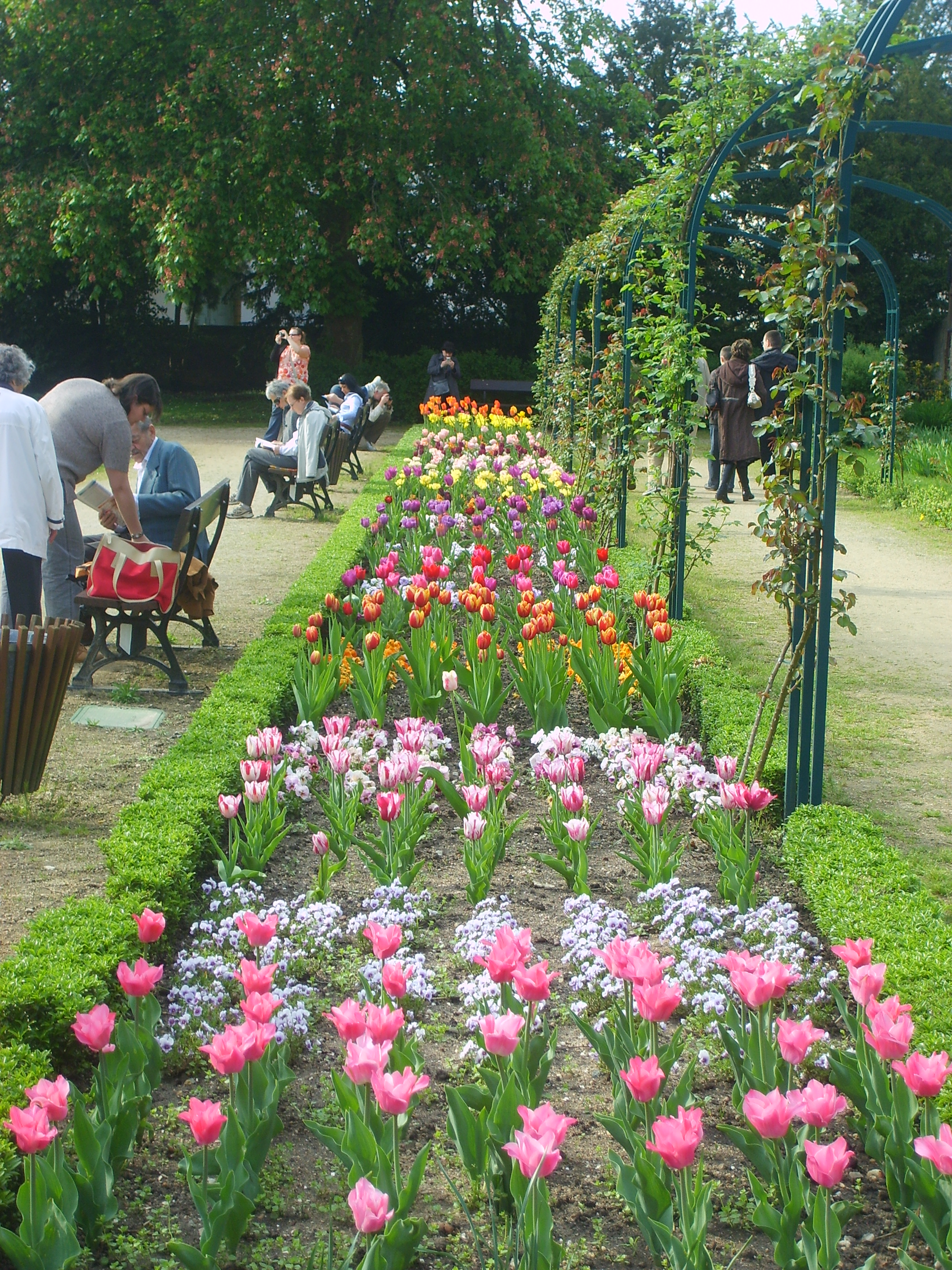 Roseraie du jardin botanique de Metz au printemps